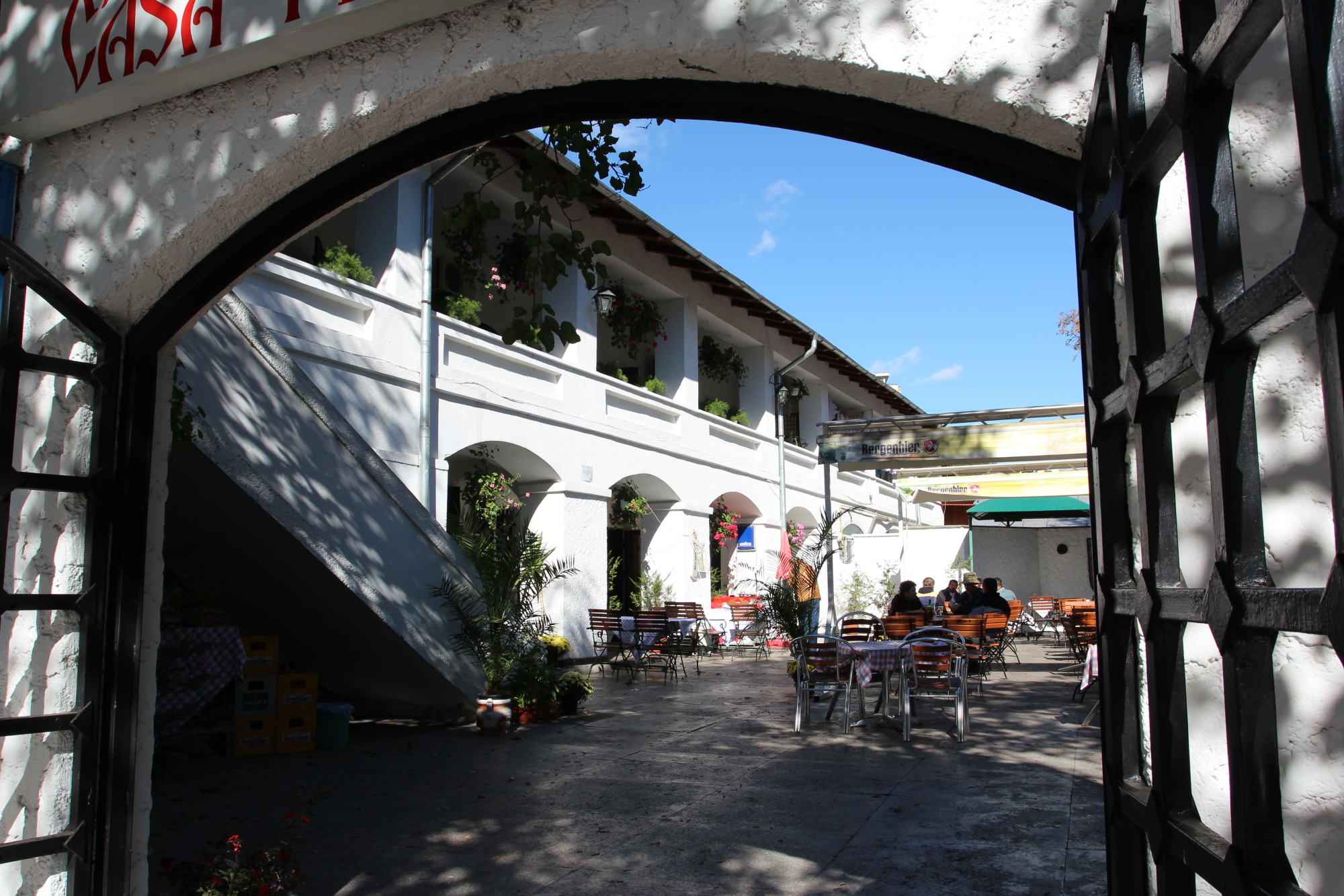 Casa Paharnicului D. Gheorghiadis, azi Restaurant